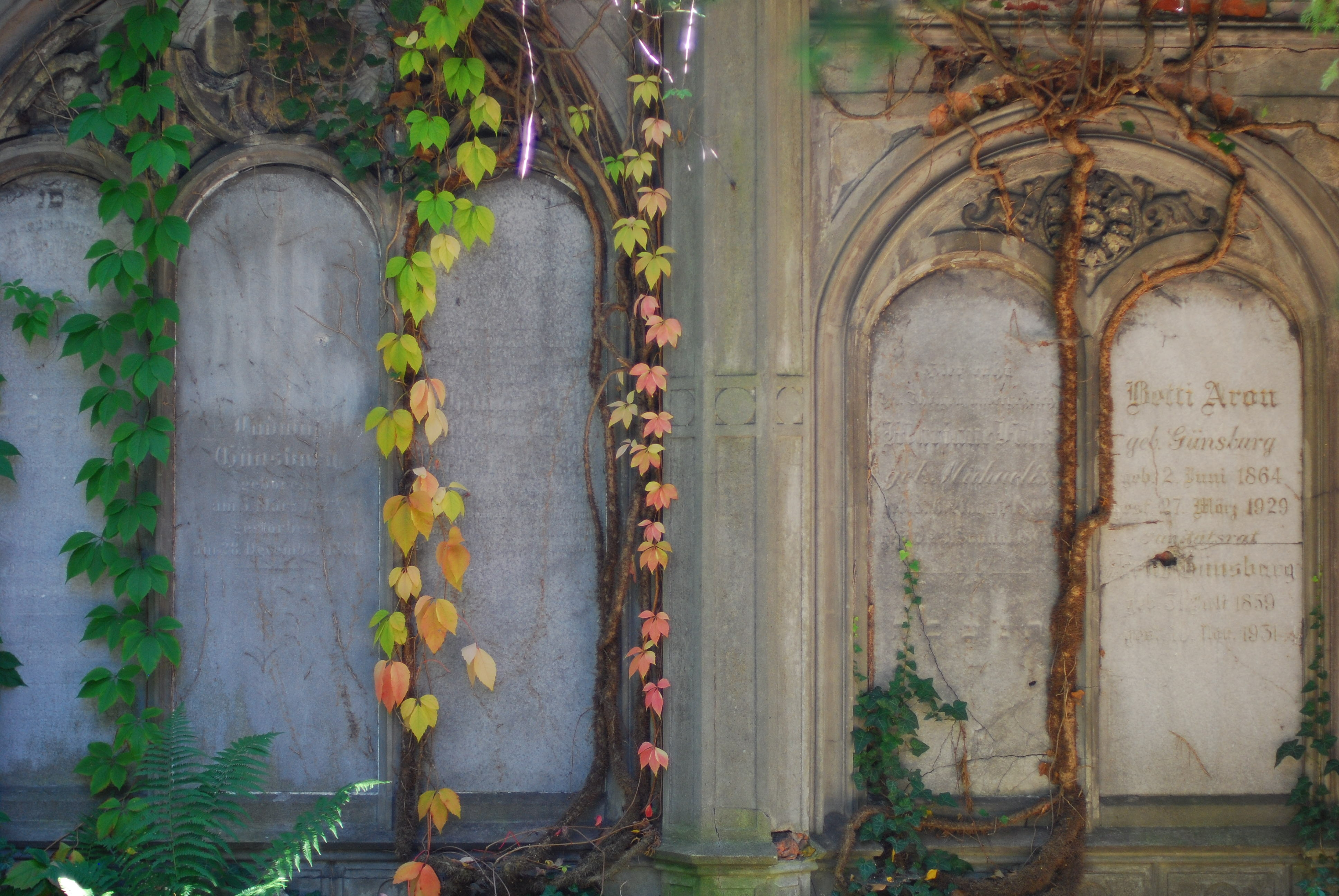 Dwa z nagrobków na Cmentarzu Żydowskim przy ulicy Ślężnej we Wrocławiu